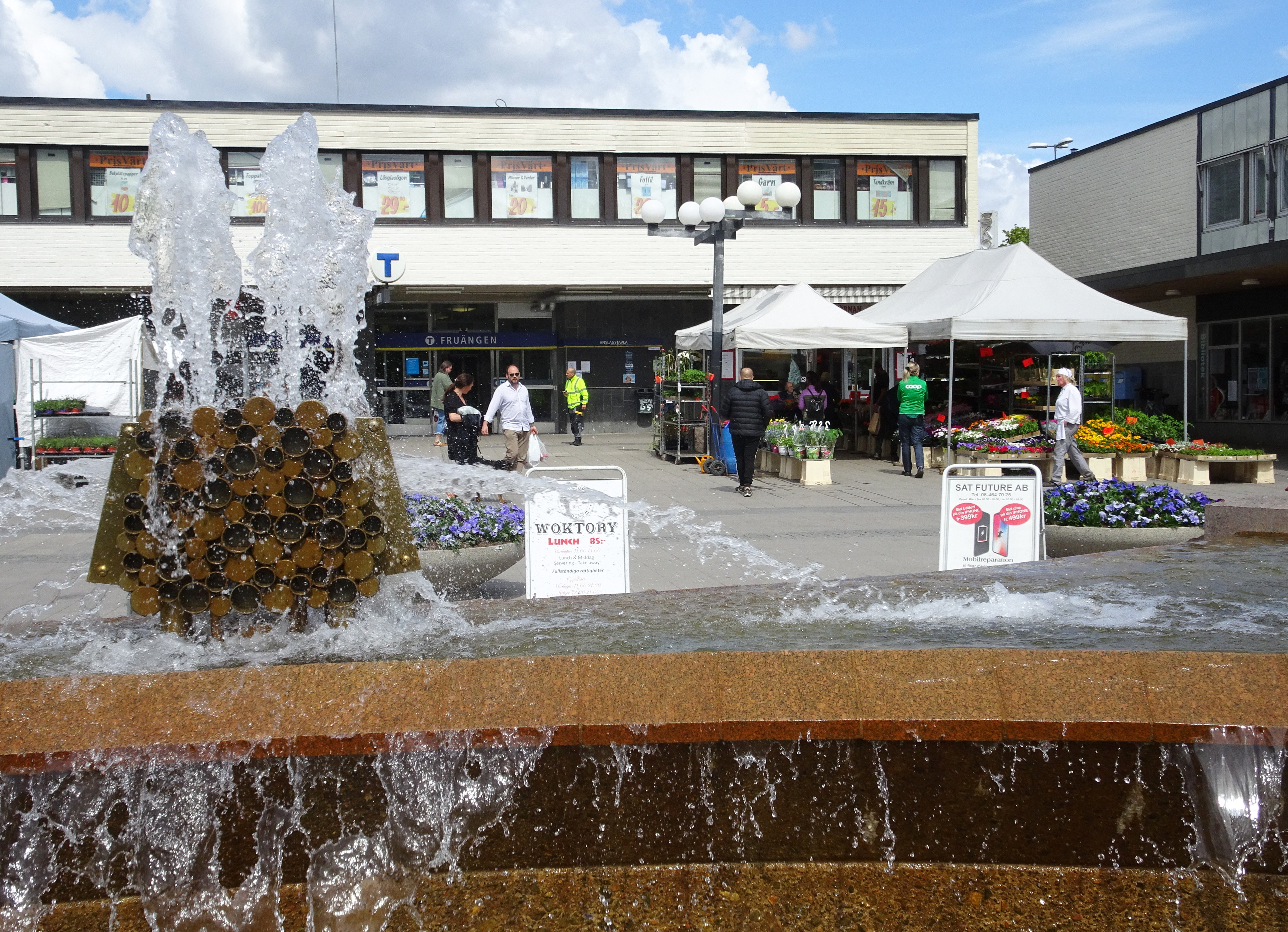 Fruängens centrum, invigd 1962, arkitekt Åke Östin. Fruängsfontänen av Bertil Johnson